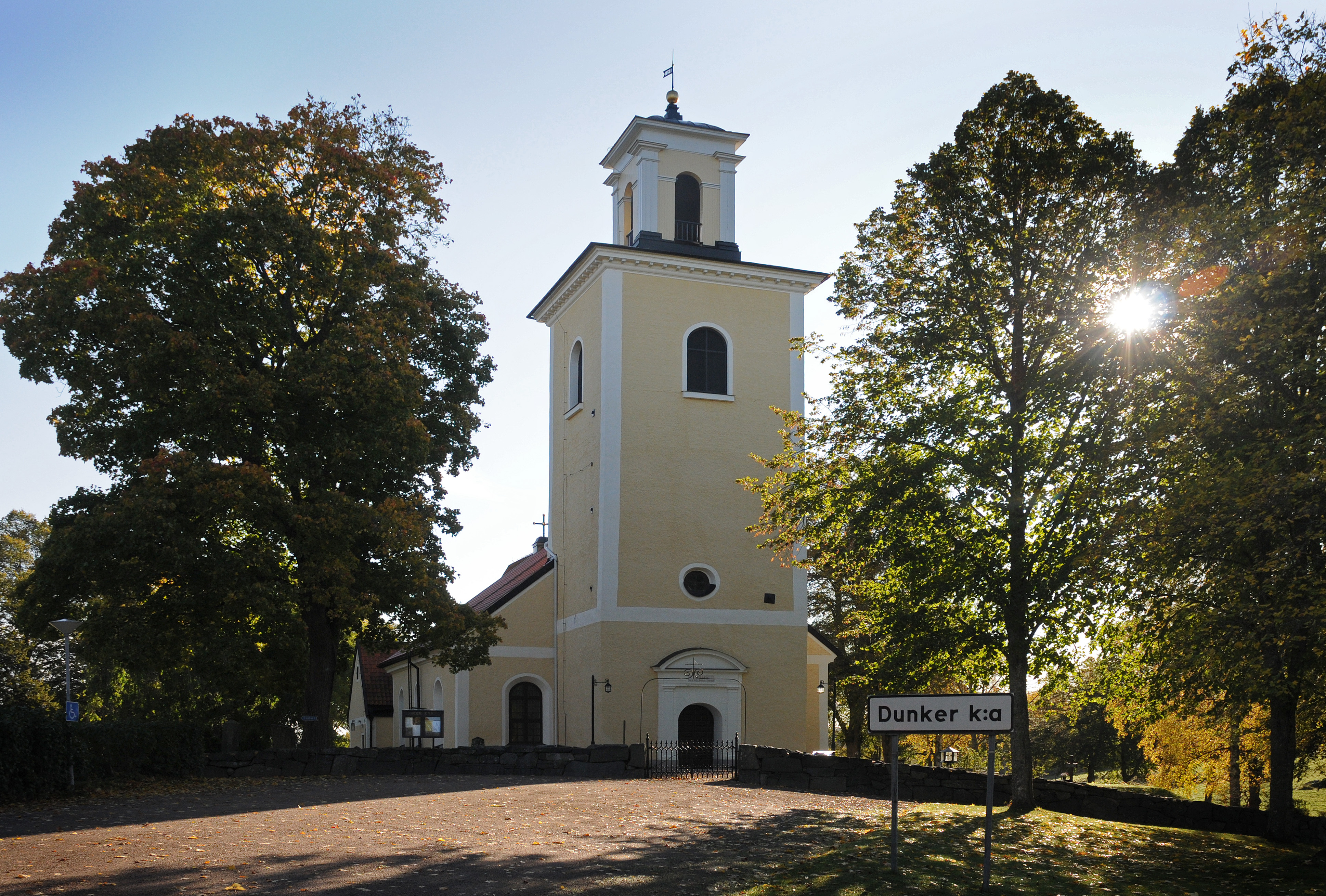 Dunkers kyrka i Flens kommun, Sörmlands län